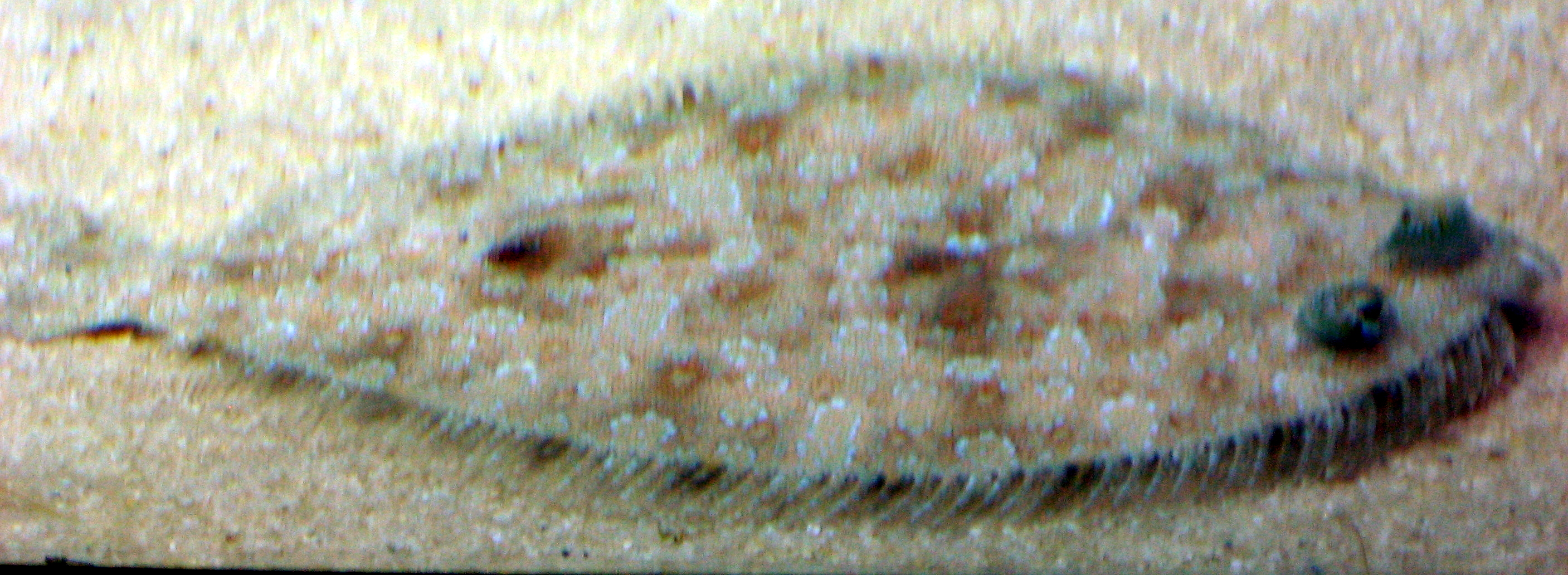 Bothus podas in Aquarium Cinéaqua Map: 48° 51' 44" N 2° 17' 27" E